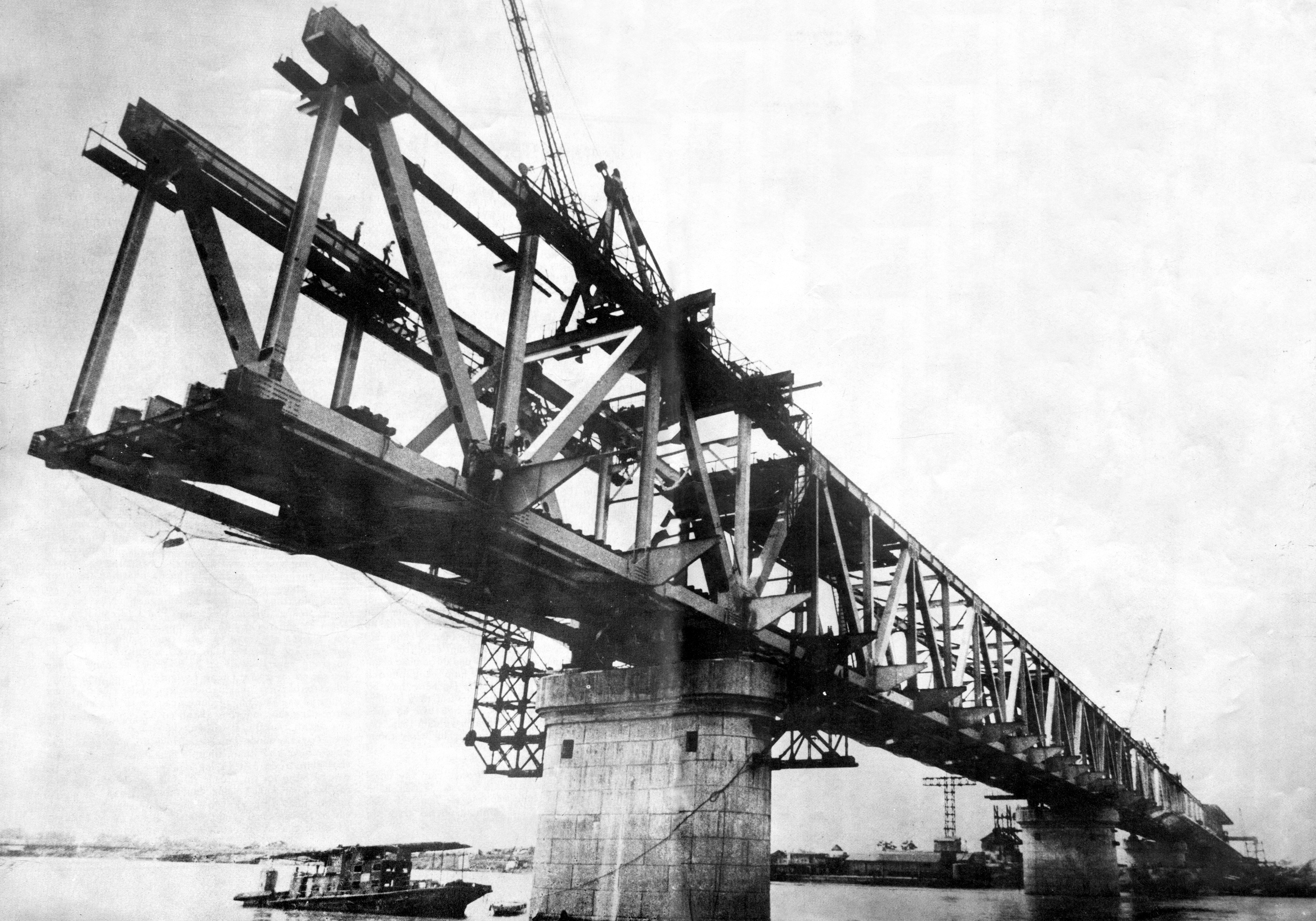 Dầm thép cầu chính đang được lắp bằng phương pháp lắp hẫng